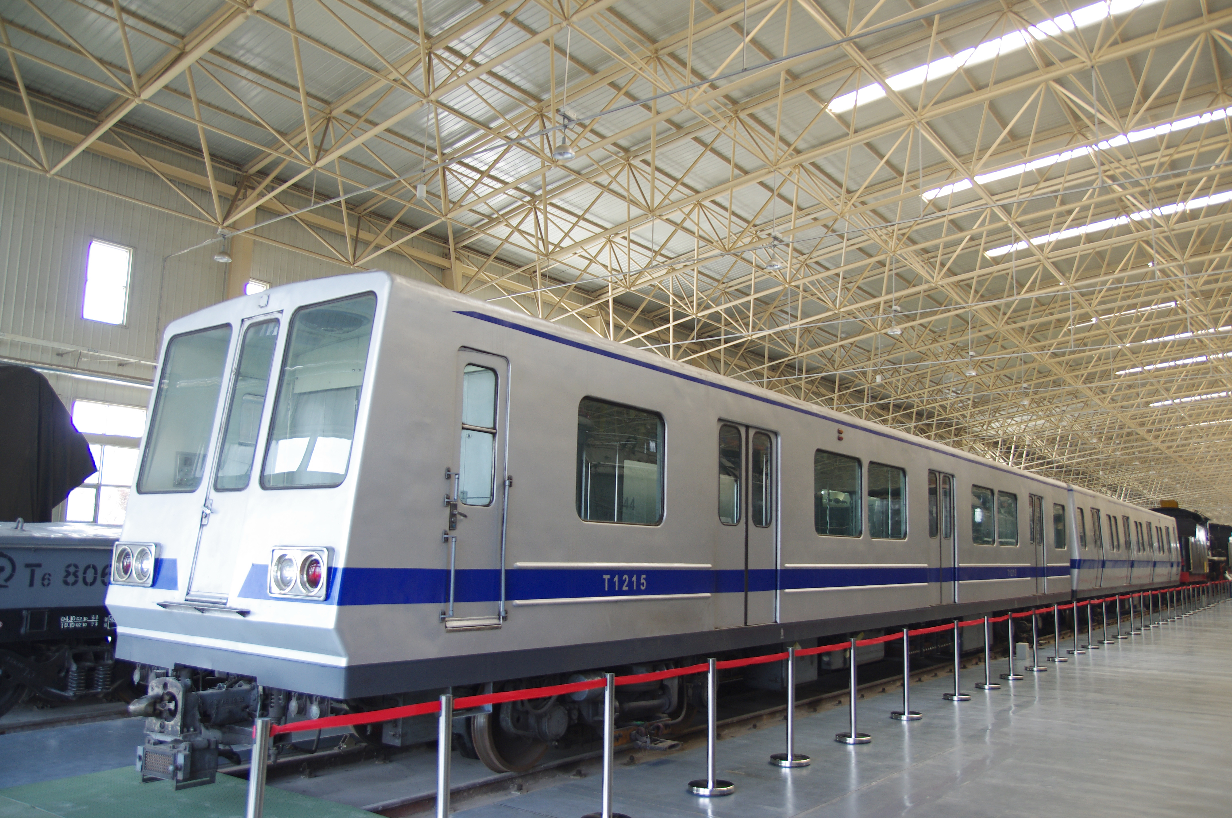 Beijing Subway T1215 at China Railway Museum 北京地铁T1215 电动车组 @中国铁道博物馆